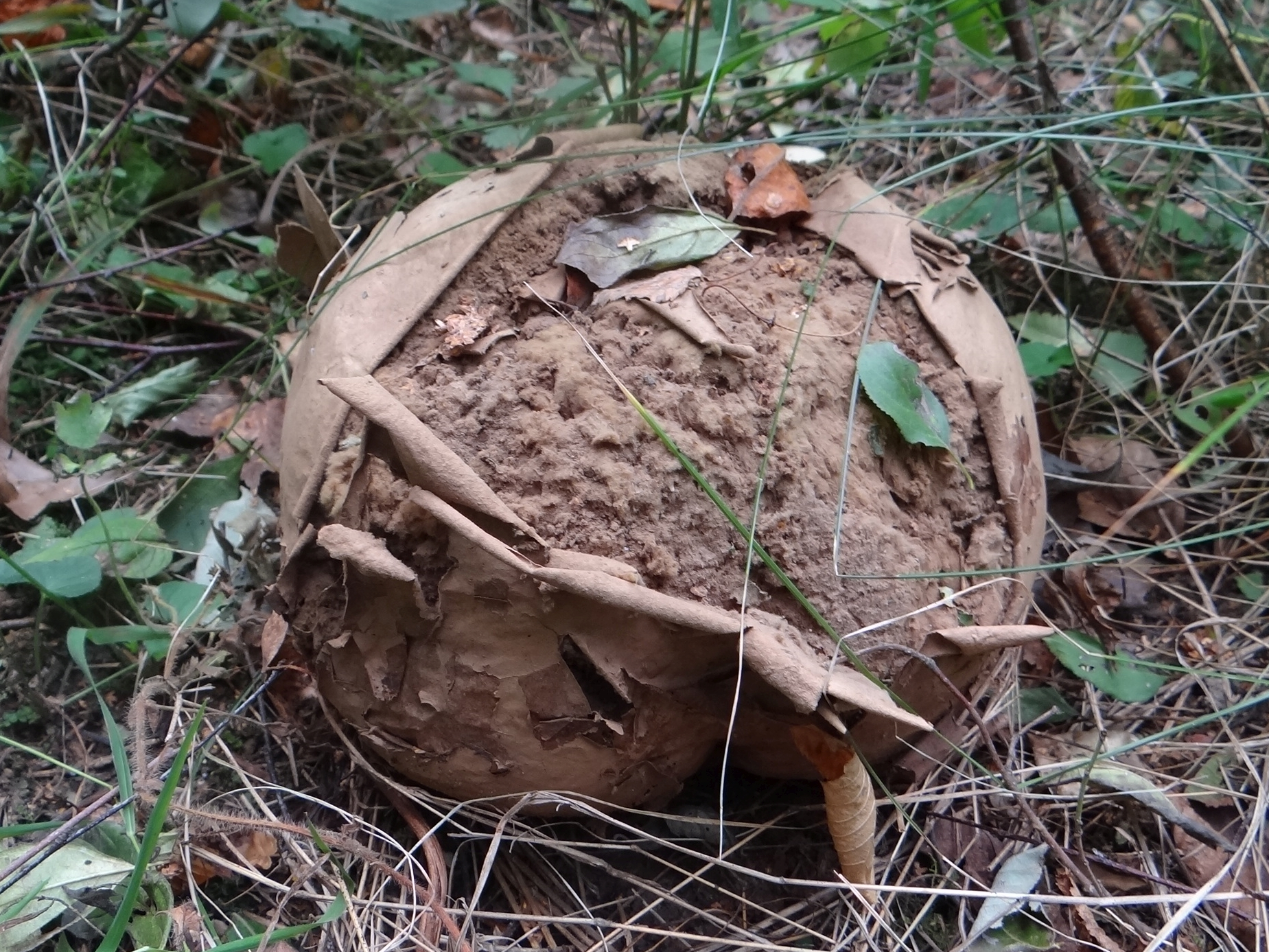 Calvatia gigantea. Location: Poland, Bębło, Mała Skałka